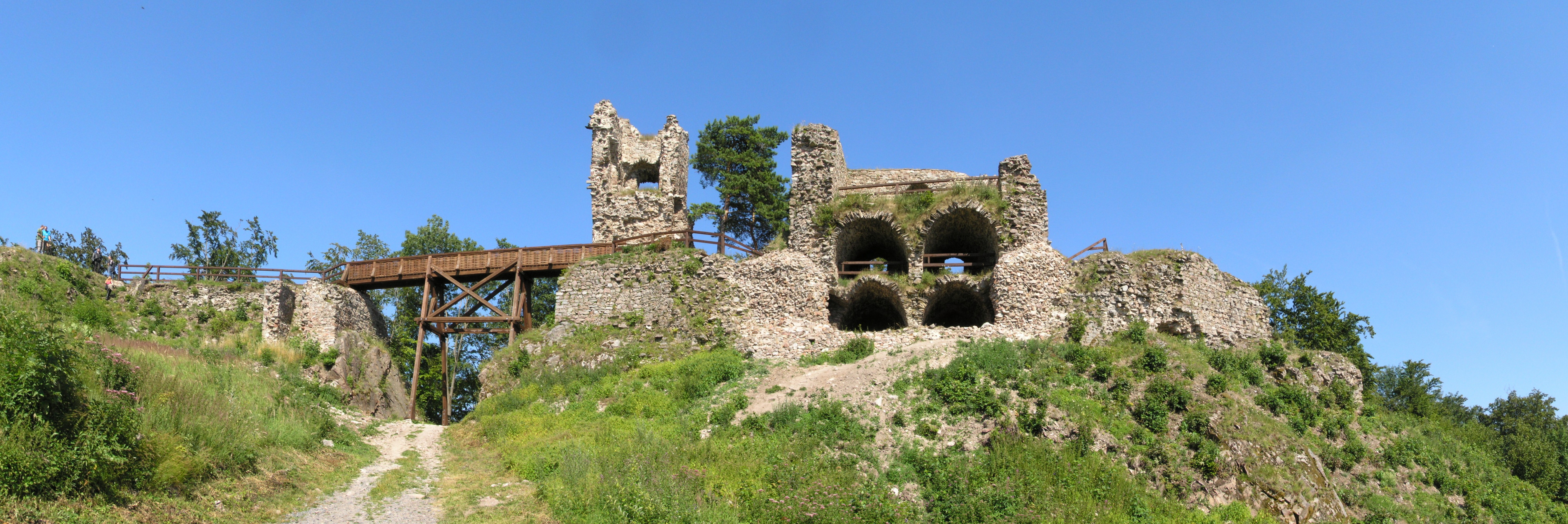 Zřícenina hradu Zubštejn nedaleko vsi Pivonice na Žďársku.